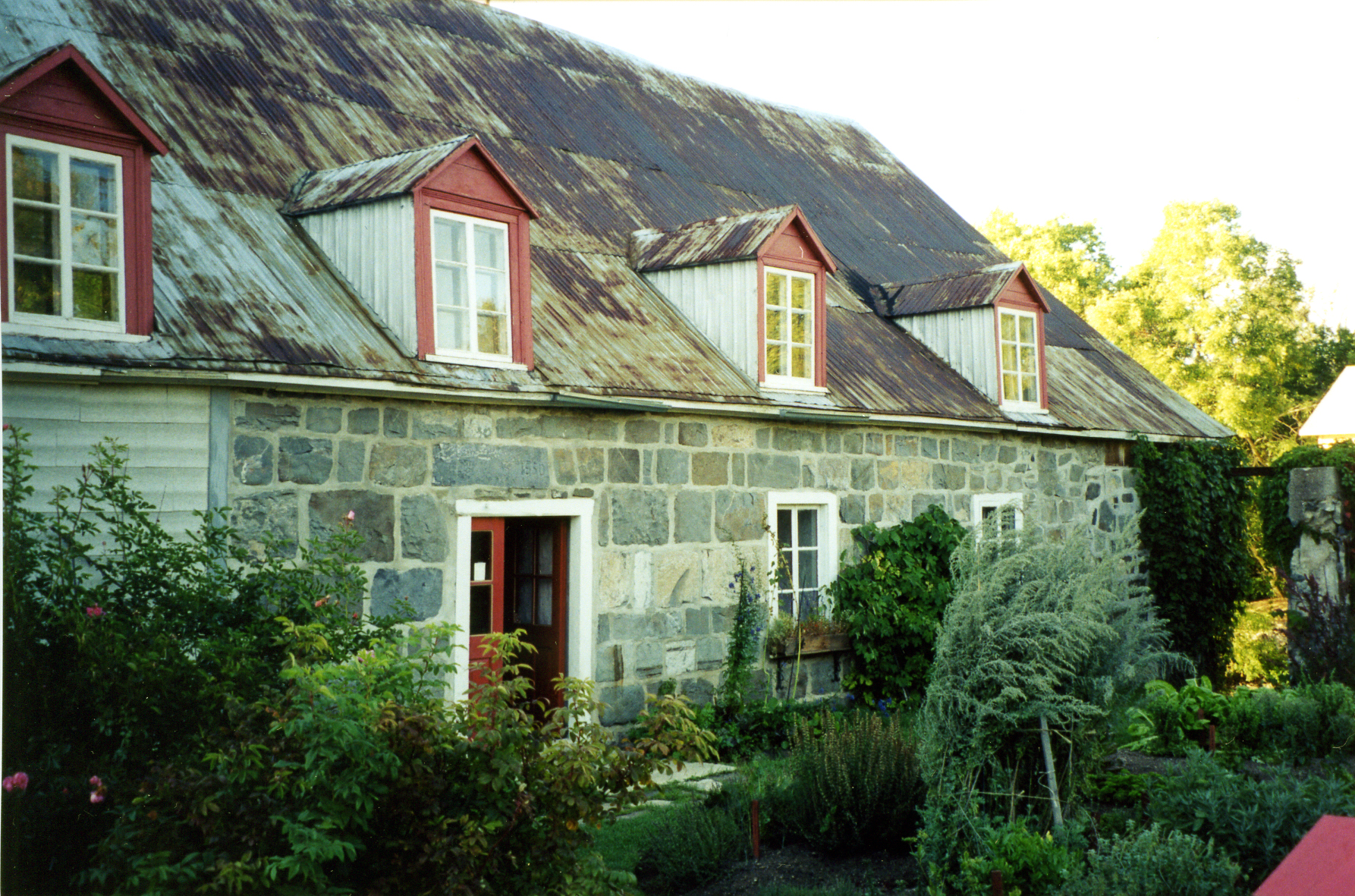 Moulin de la rivière Trois-Saumons, situé à Saint-Jean-Port-Joli (Chaudière-Appalaches, Québec. Moulin à eau; moulin à farine.